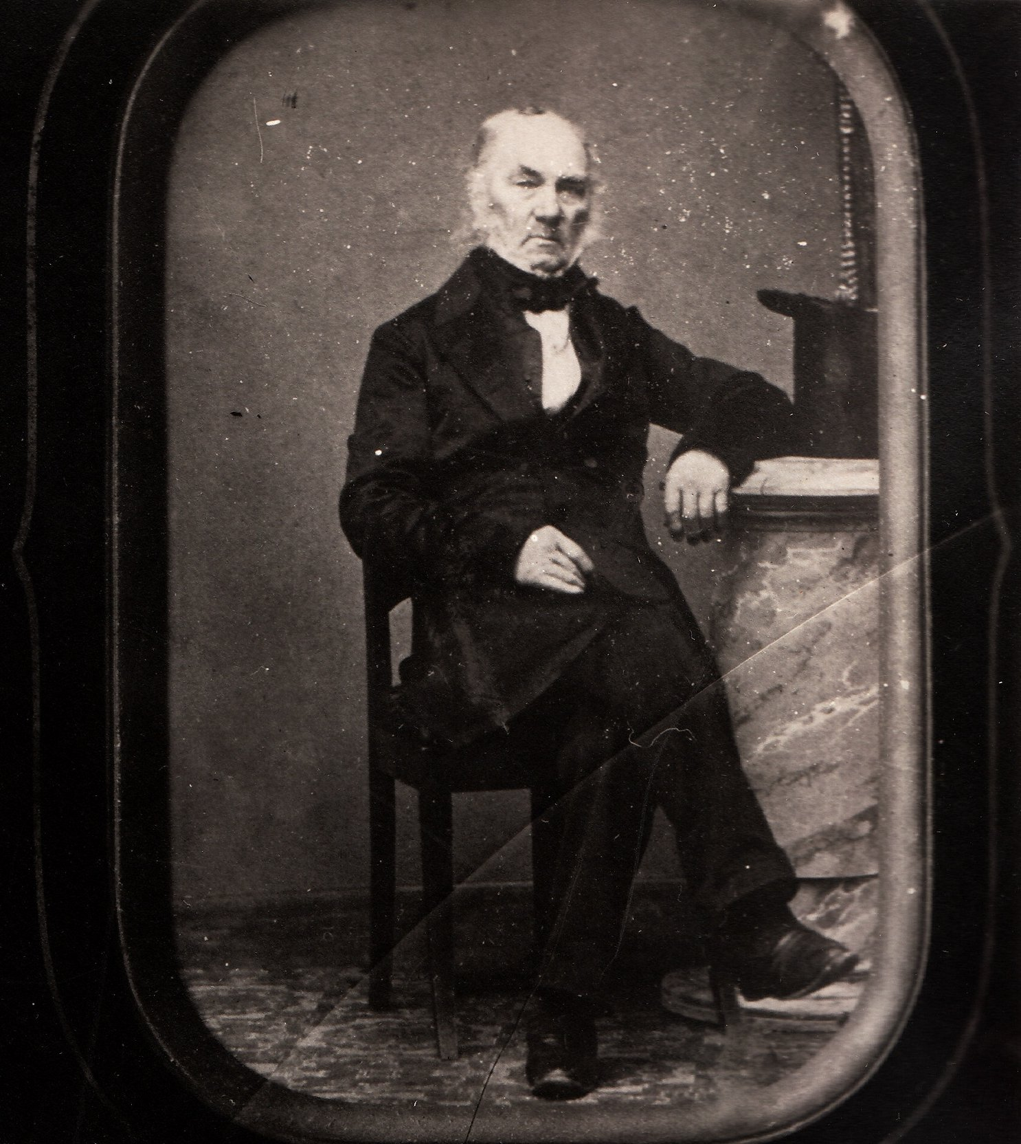 Format: Fotopositiv Dato / Date: 1897 Fotograf / Photographer: Erik Olsen (1835 - 1920) Sted / Place: Trondheim Eier / Owner Institution: Trondheim byarkiv, The Municipal Archives of Trondheim Arkivreferanse / Archive reference: Tor.H41.B40.F2948 Merknad: Fra utstillingen i anledning Trondhjems 900-årsjubileum i 1897. Utstillingstekst i Trondhjems 900 Aars Jubilæum: Katalog for Den Historiske Udstilling i Trondhjem 1897: 1005 - 1006. Kaald, Paul Andreas, f. 1784 i T.hjem, Søn af Albrigt Hansen K. (f. 1732, d. 1789), Justitssergeant og Politibetjent i Trondhjem; Skibskaptein. G. m. Wilhelmine Kristine Stub. Var i 1808 Fører af Kaperen Den Flinke af Trondhjem som om Høsten blev taget af Engelskmændene og indbragt til Leith, hvorefter han i 2 Aar sad i engelsk Fangenskab. Hans Dagbog herfra findes trykt i Uddrag i Skill. Mag. f. 1875. 1005. OM., Brystbill. i fuld Størr. *Willas Kaald, Hitteren. 1006. Fotografi. 78 Aar gml. 1862. *Willas Kaald, Hitteren. [Det gjengitte bilde her er fotografiet fra 1862 nr. 1006.] Kaptein Kaald var en av de mest vellykkede norske kaperkapteinene under Napoleonskrigene. Han var flere ganger på tokt fra 1808 til 1814, og satt fengslet i Edinburgh i to år. Hans tokt med skipet Anna Bruun i 1813 gjorde ham til en meget rik mann. Paul Andreas Kaald was one of the most successful Norwegian privateers during the Napoleonic Wars. He was active on several ships between 1808 - 1814 and was imprisoned in Edinburgh for two years. In 1813 he collected several prizes with the ship Anna Bruun, making him a wealthy man.